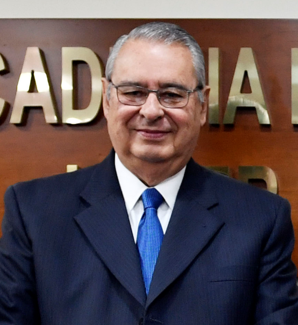 Allan Wagner durante inauguración del año lectivo de la Academia Diplomática del Perú "Javier Pérez de Cuéllar"